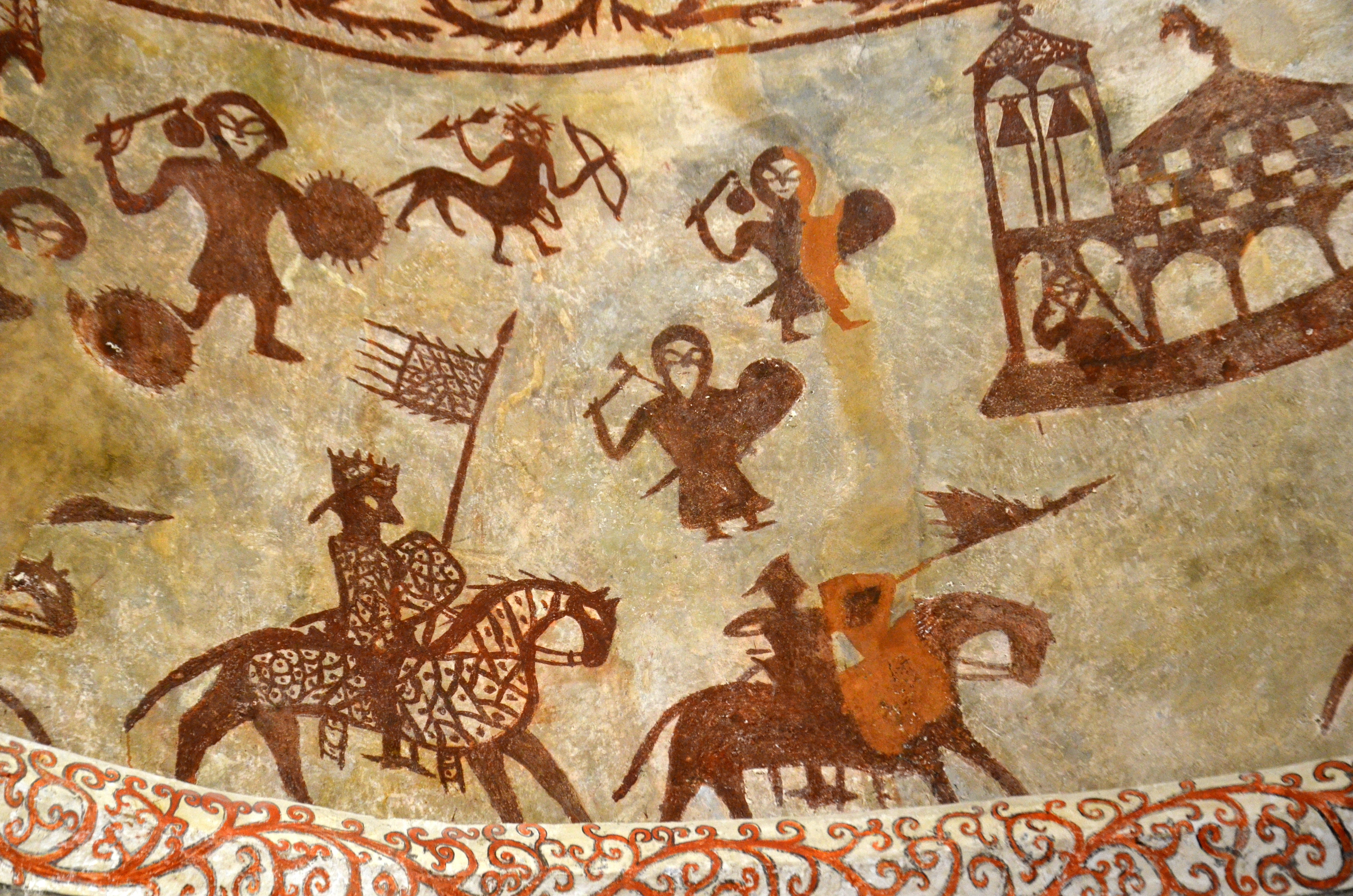 Alaitzako eliza erromanikoa, bere margolan ikusgarri bezain bereziekin.